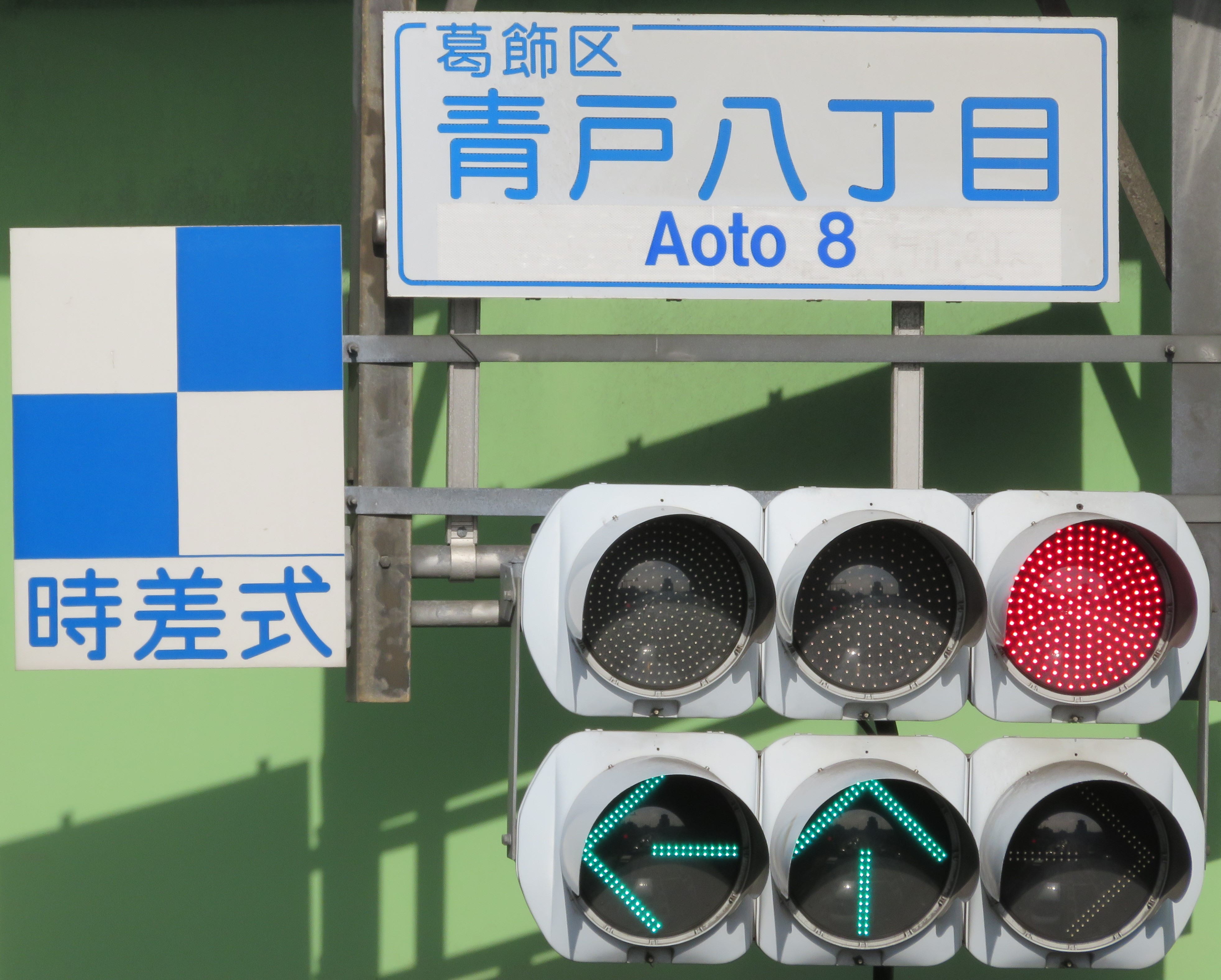 東京都葛飾区内に設置されている時差式信号機の表示板と信号灯器 Canon PowerShot SX720 HS